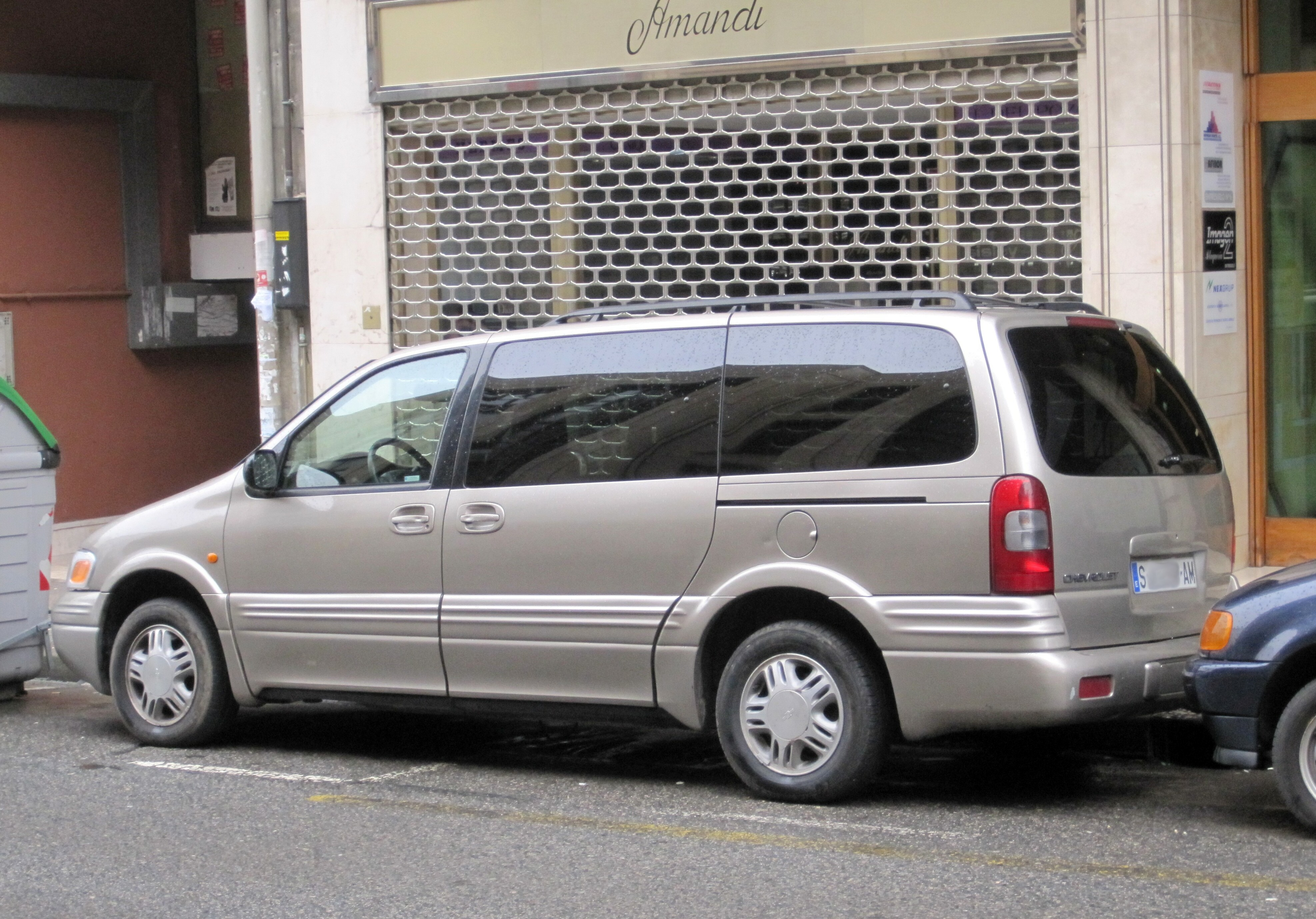 1999 plate from Santander (Cantabria).